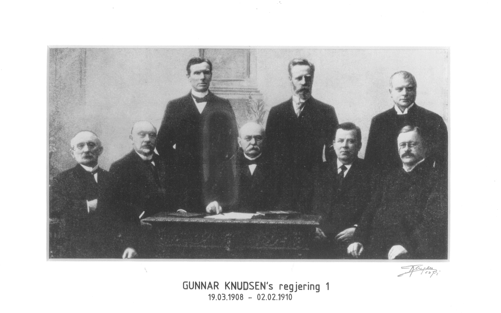 Bildet er feilaktig merket Gunnar Knudsens regjering 1, men viser hans andre i 1913. Gunnar Knudsens andre regjering satt fra 31. januar 1913 til 21. juni 1920, og hadde i perioden ulike medlemmer. Fra venstre: 1. Hans V. Keilhau, forsvarsminister 2. Nils Claus Ihlen, utenriksminister 3. Lars Abrahamsen, justisminister 4. Gunnar Knudsen, statsminister 5. Anton T. Omholt, finansminister 6. Aasulv Bryggesaa, kirke- og undervisningsminister 7. Andreas Urbye, arbeidsminister 8. Johan Castberg, sosial- og handelsminister